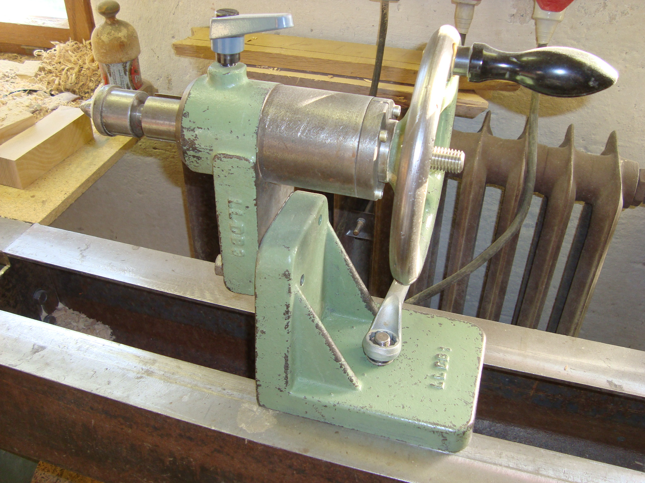 Reitstock einer Holzdrehbank